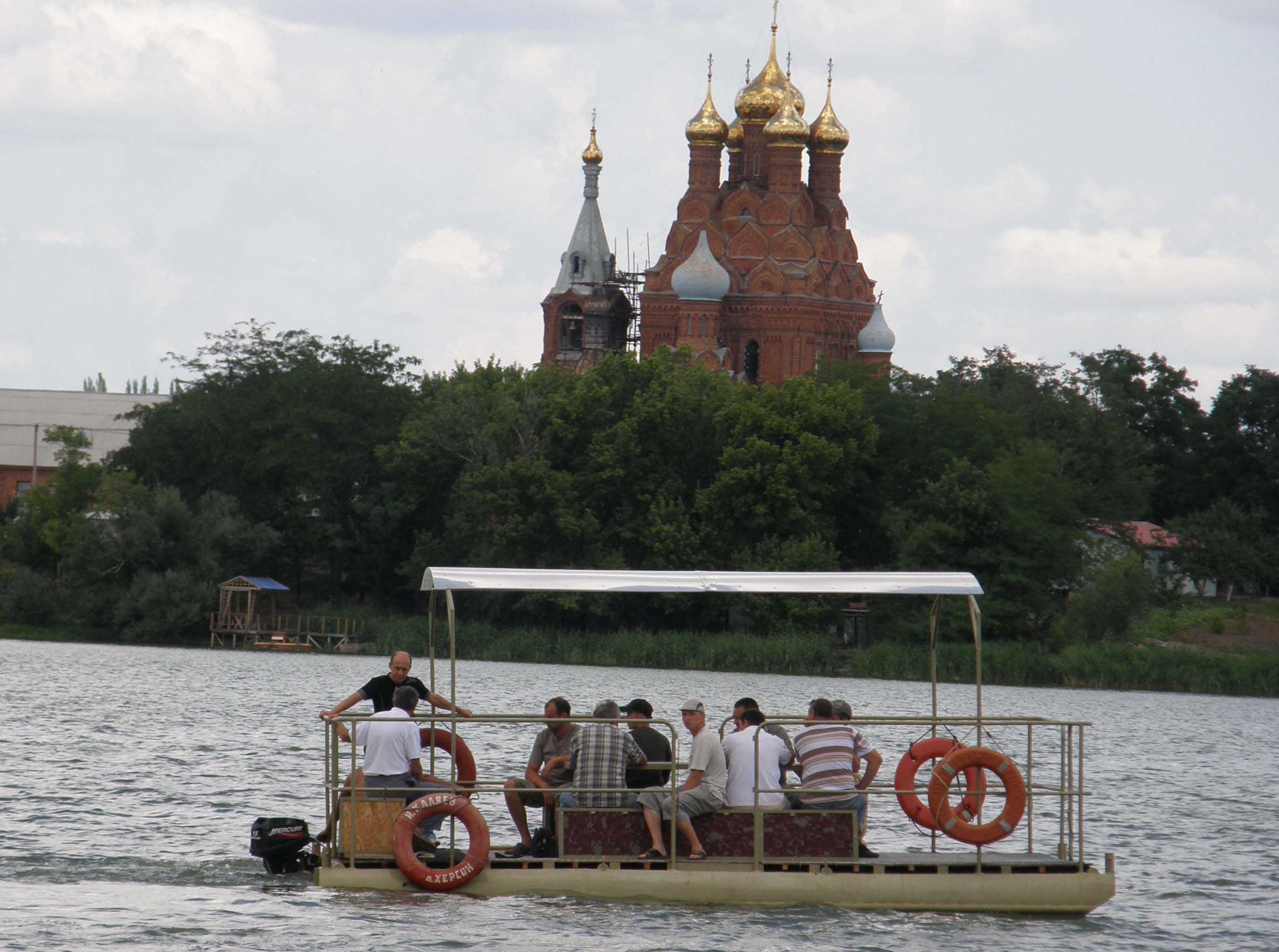 РЛП Приингульский - Свято-Михайловская церковь